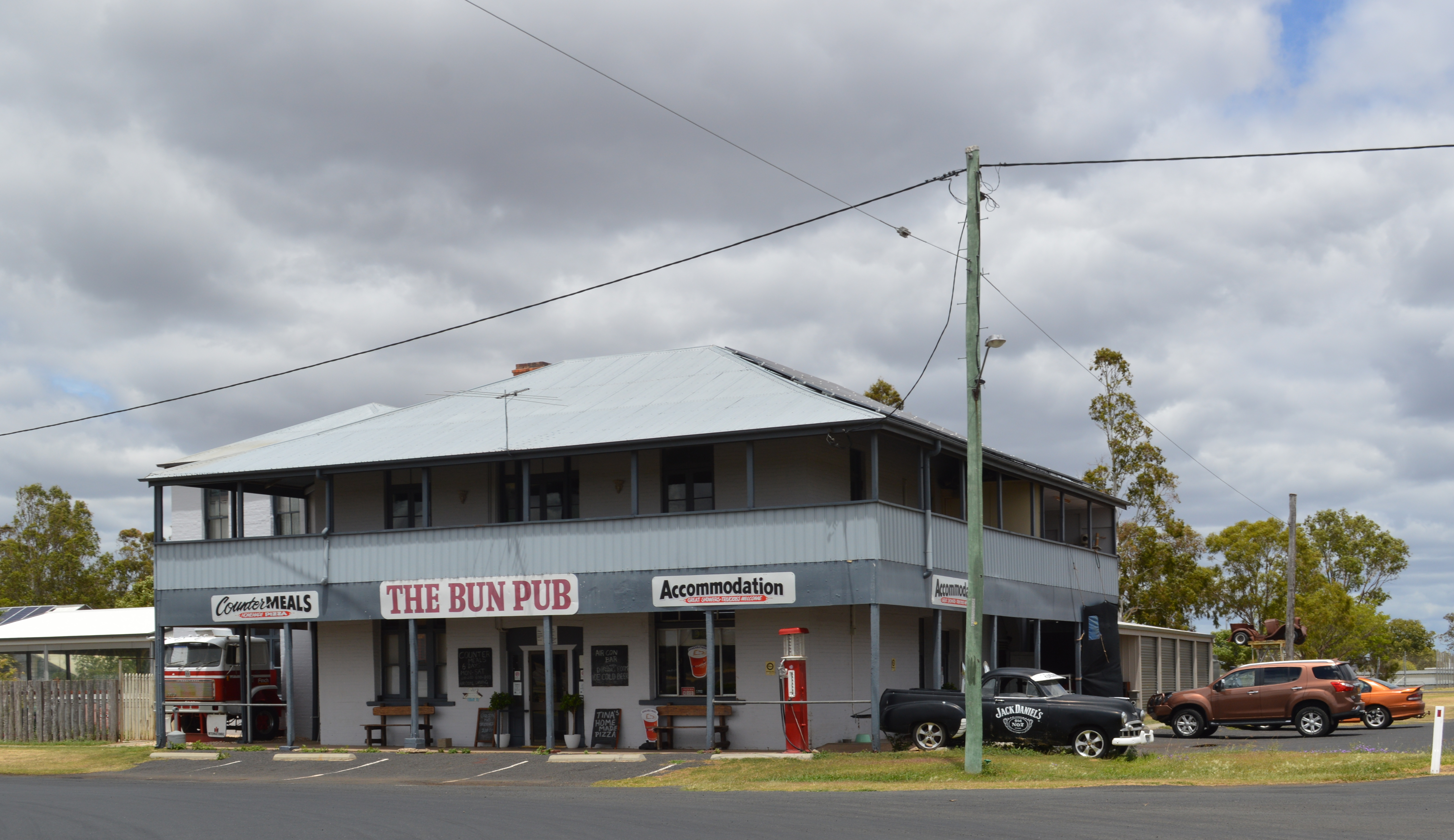 en}The "Bun Pub" at Kaimkillenbun, Queensland